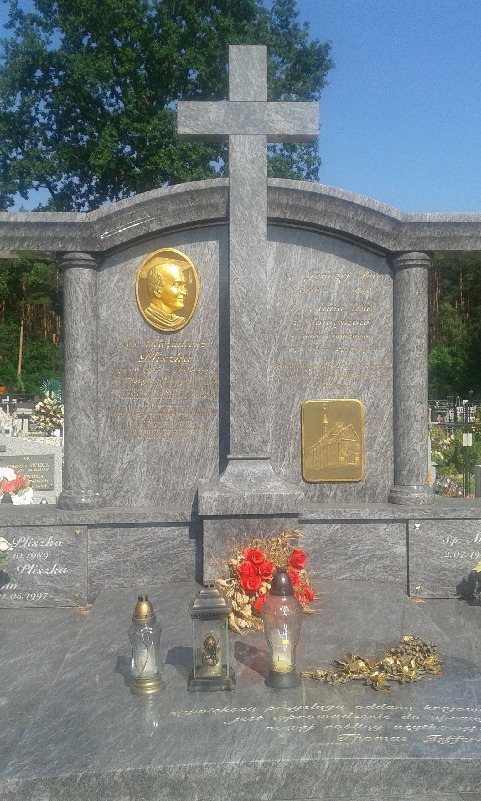 Nagrobek Kazimierza Pliszki oraz Jędrzeja i Anny Dulów.